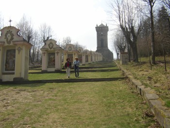 Křížová cesta u Jiřetína pod Jedlovou